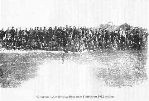 Serbian commander Vojin Popović-Vojvoda Vuk and his detachment in Prilep, 1912